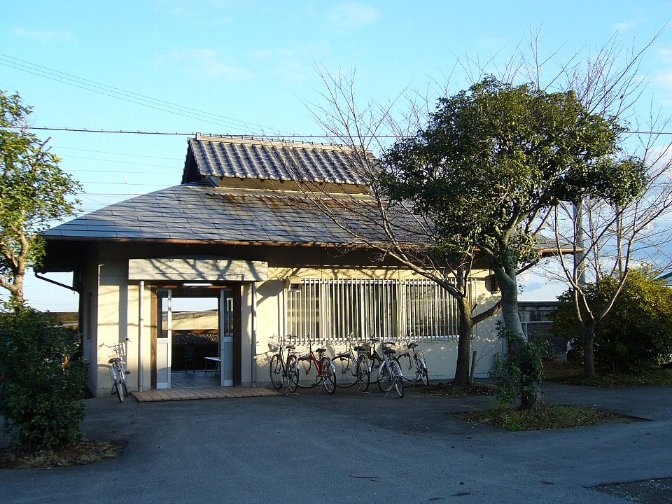 予讃線石鎚山駅 駅舎 2006年12月 Bakkai撮影